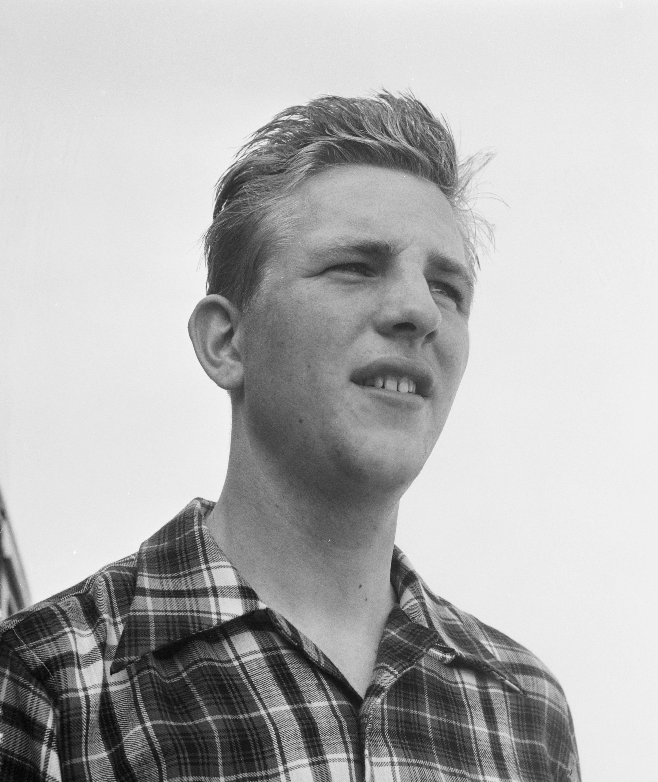 Olympische deelnemers D. De Groot Amsterdam